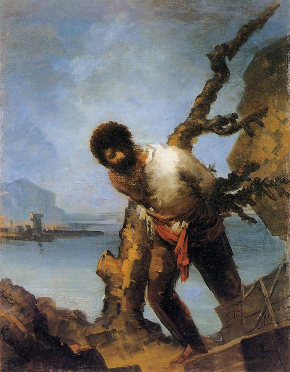 El náufrago or